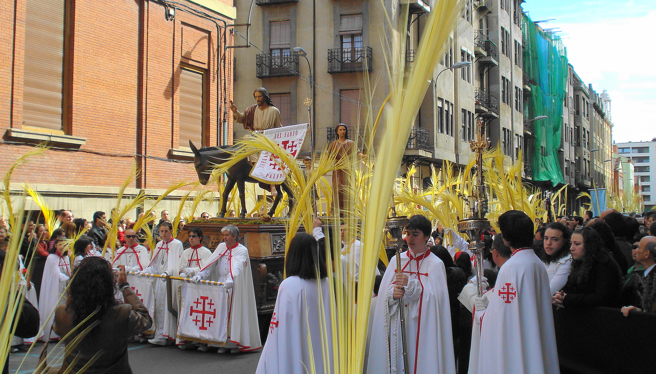 Batir de Palmas en Palencia